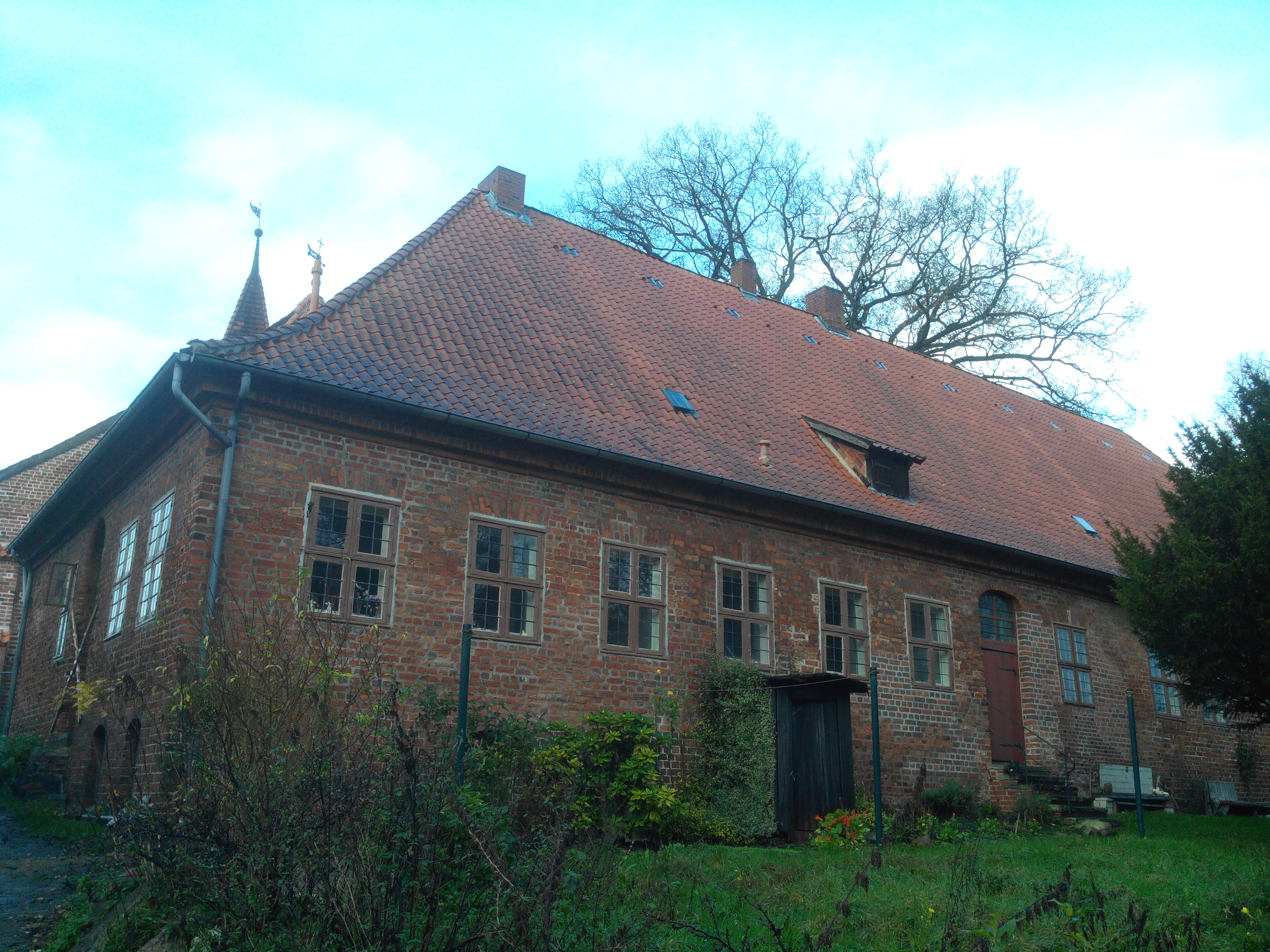 Das Frauenhaus von Osten